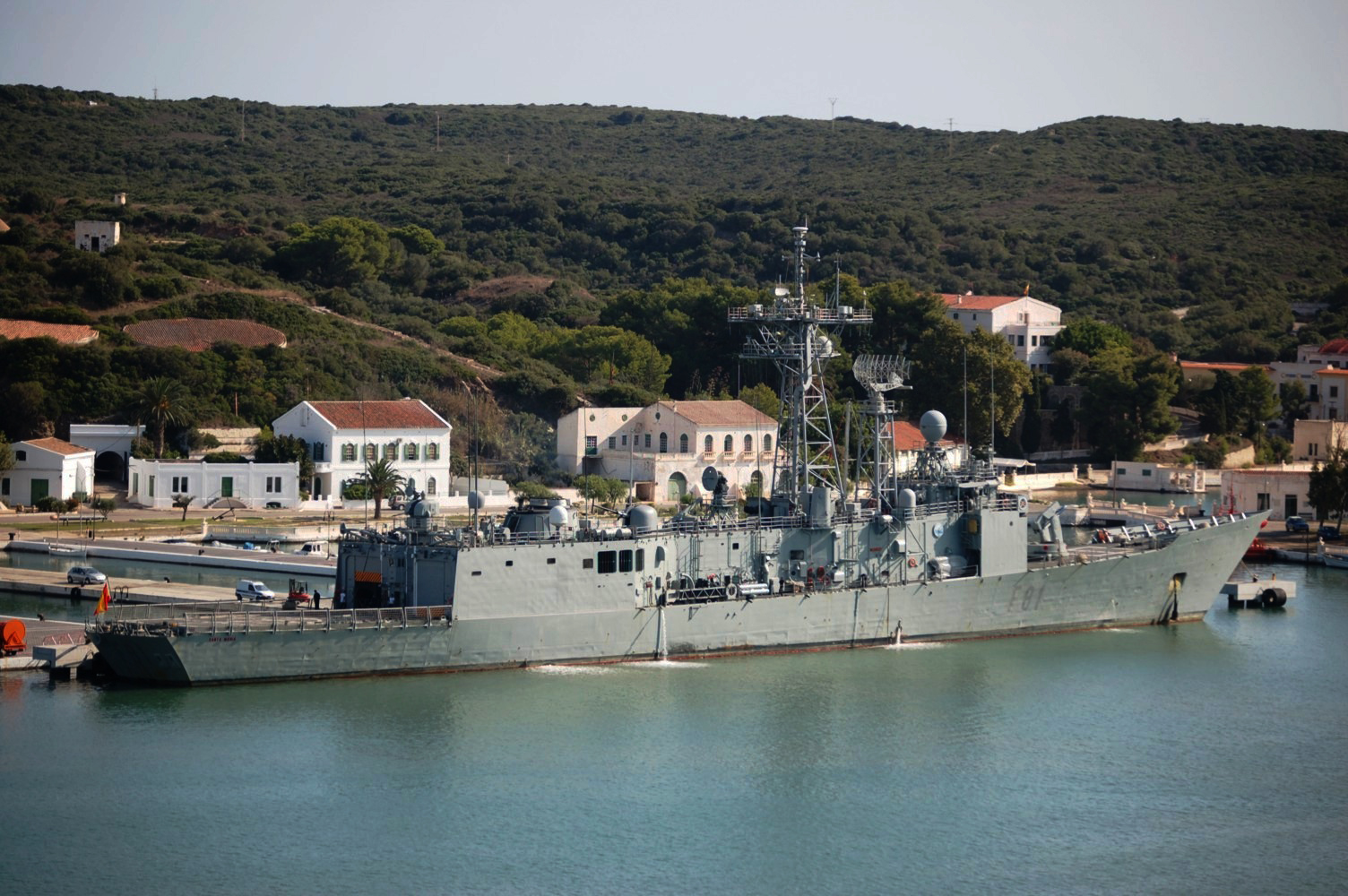 La fragata Santa María (F81), atracada en la base naval de La Graña, Ferrol.